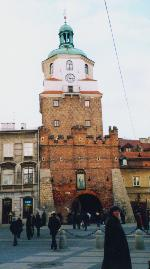 Brama Krakowska w Lublinie.